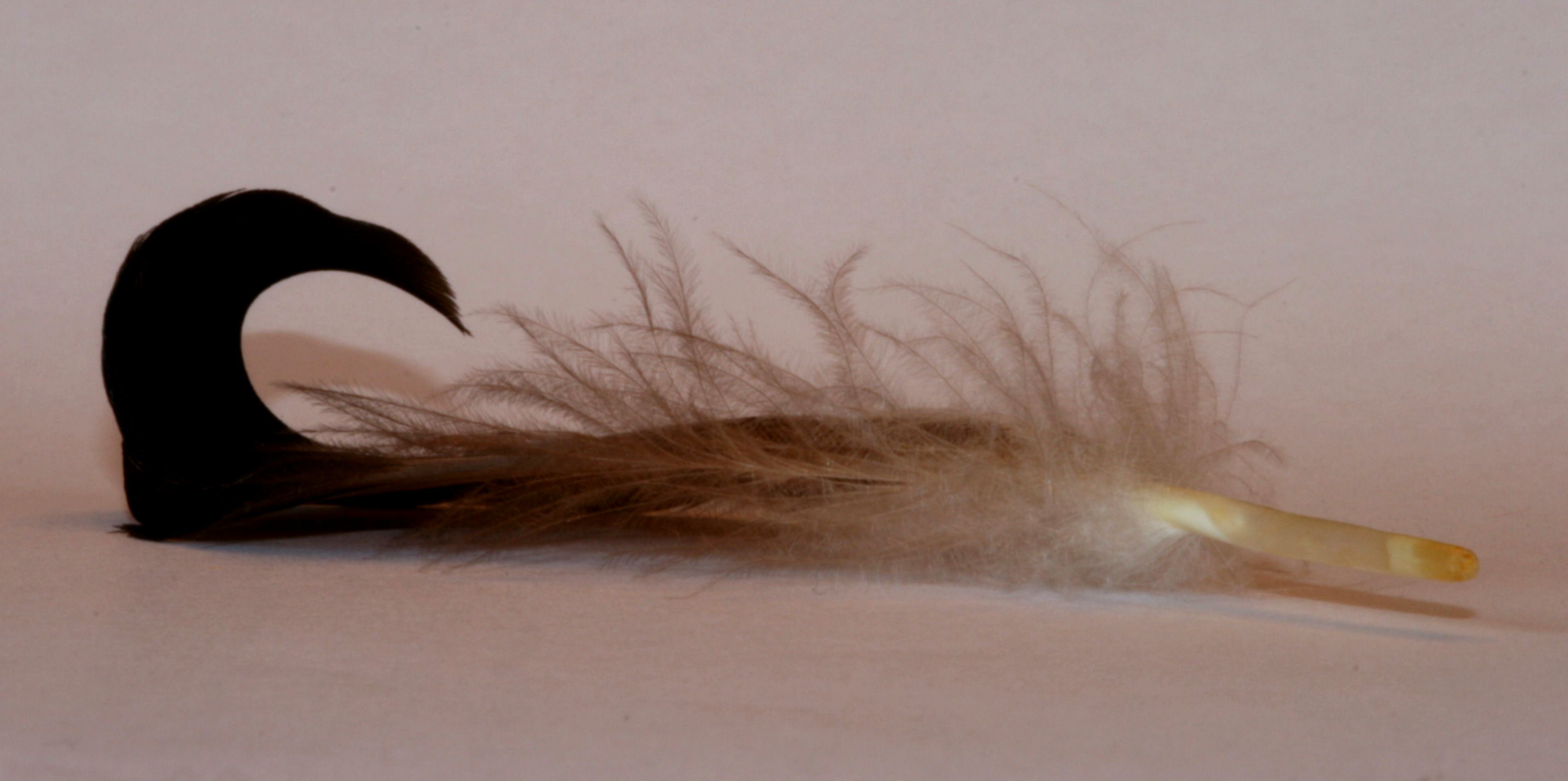 Charakteristisch geformte Erpellocke einer Stockente